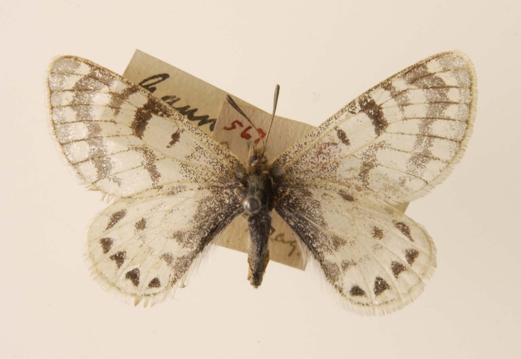 Parnassius hunnyngotnii